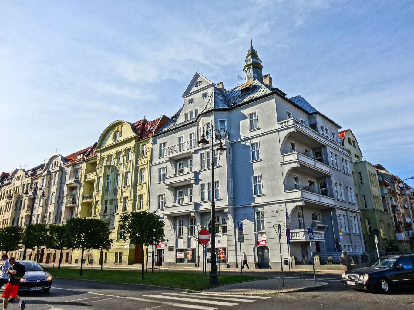 Aleja Adama Mickiewicza w Bydgoszczy